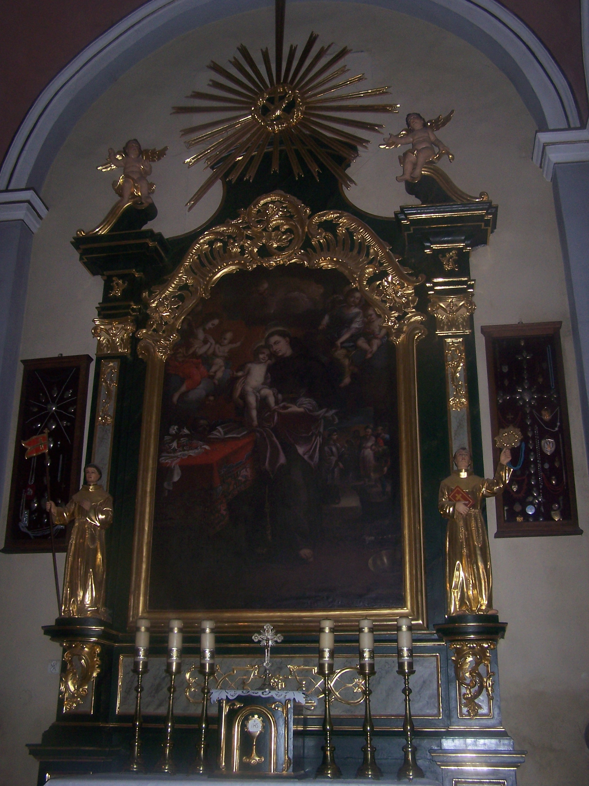 Cudowny Obraz świętego Antoniego z Padwy w kościele oo. Bernardynów w Przeworsku